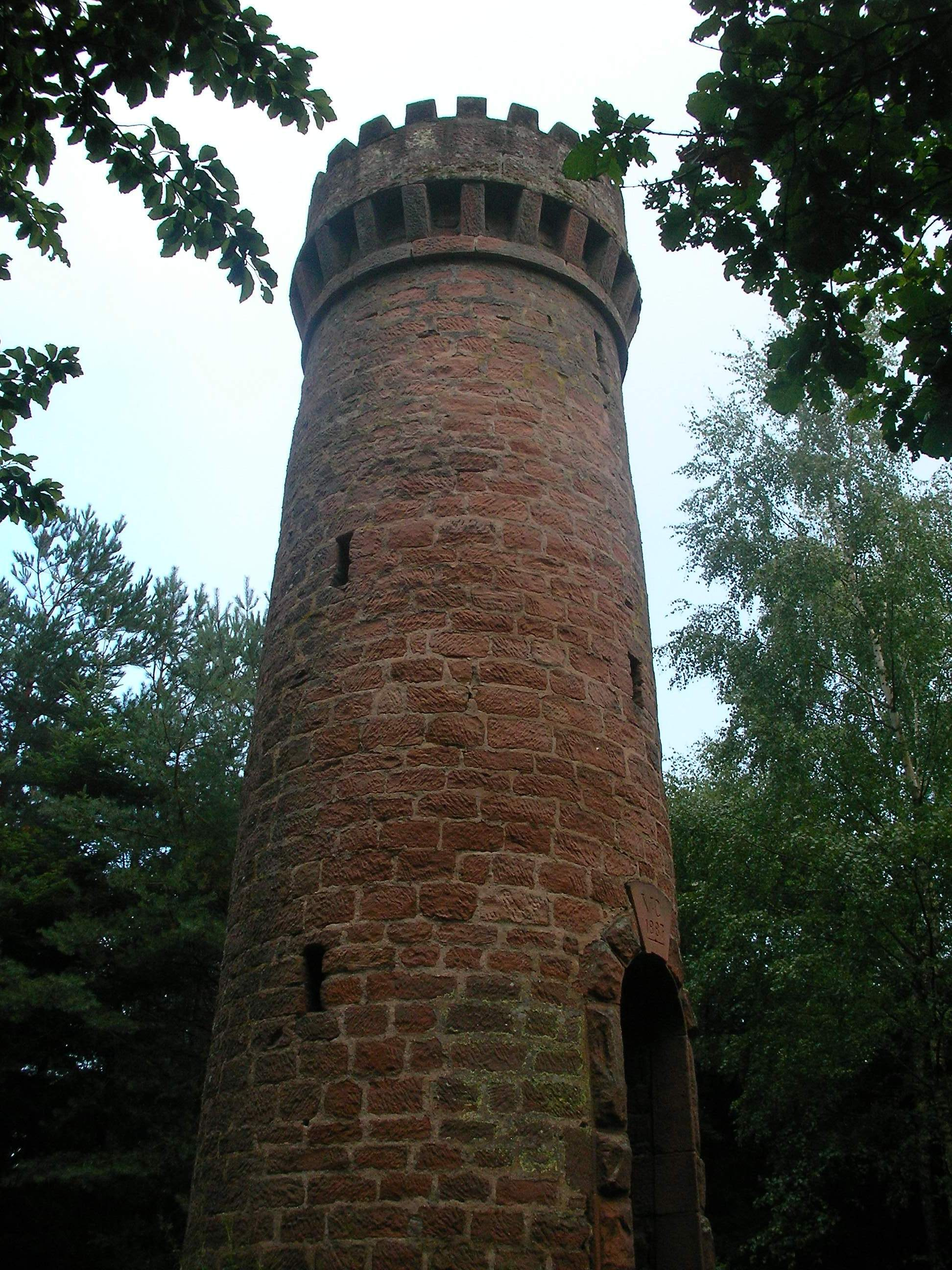 Tour-belvédère du Wasenkoepfel à Oberbronn (Bas-Rhin, France).